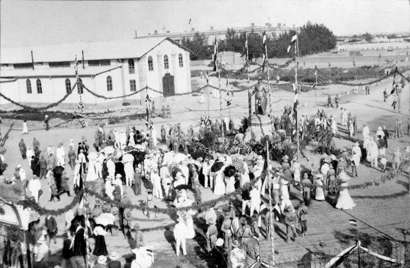 Die Enthüllungsfeier des Deutschen Kriegerdenkmals am 17ten Juni 1905 zu Tientsin Besichtigung nach der Enthüllung